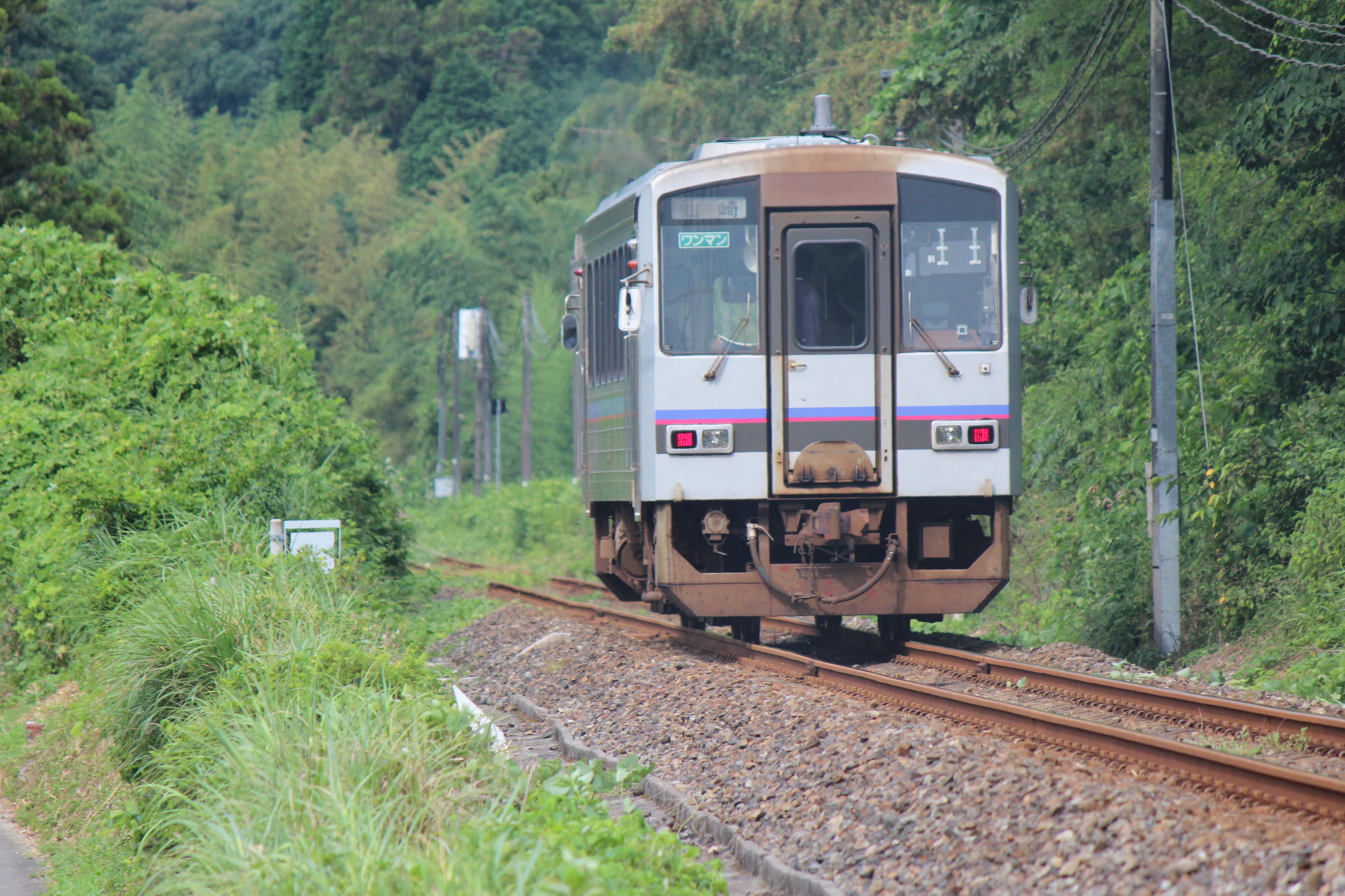 美祢線を走るキハ120です。